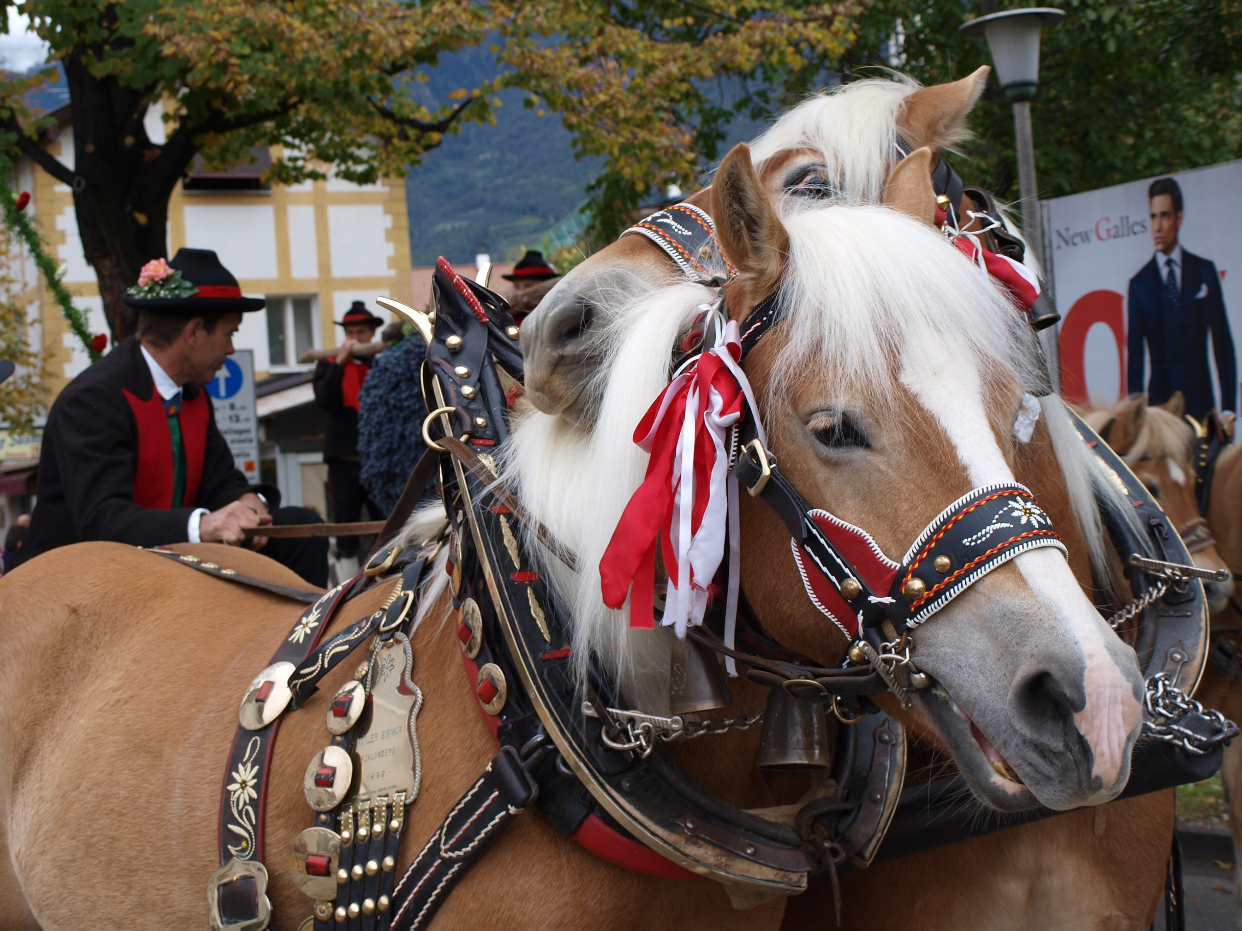 Haflinger Tags: Merano, Festa dell‟Uva, Alto Adige, corteo, autunno meranese